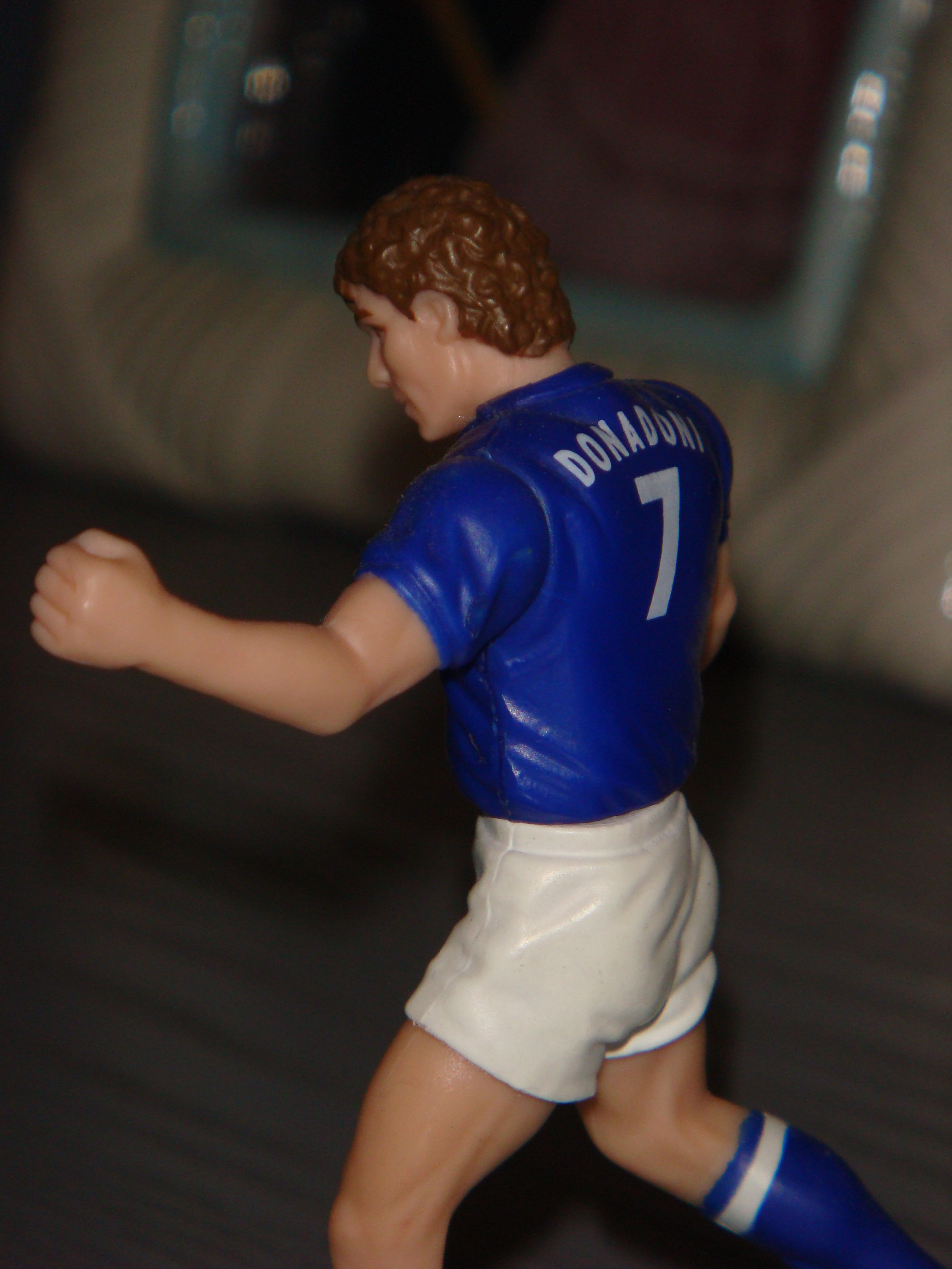 Модель игрока сборной Италии, игравшего на мировом первенстве 1990 года